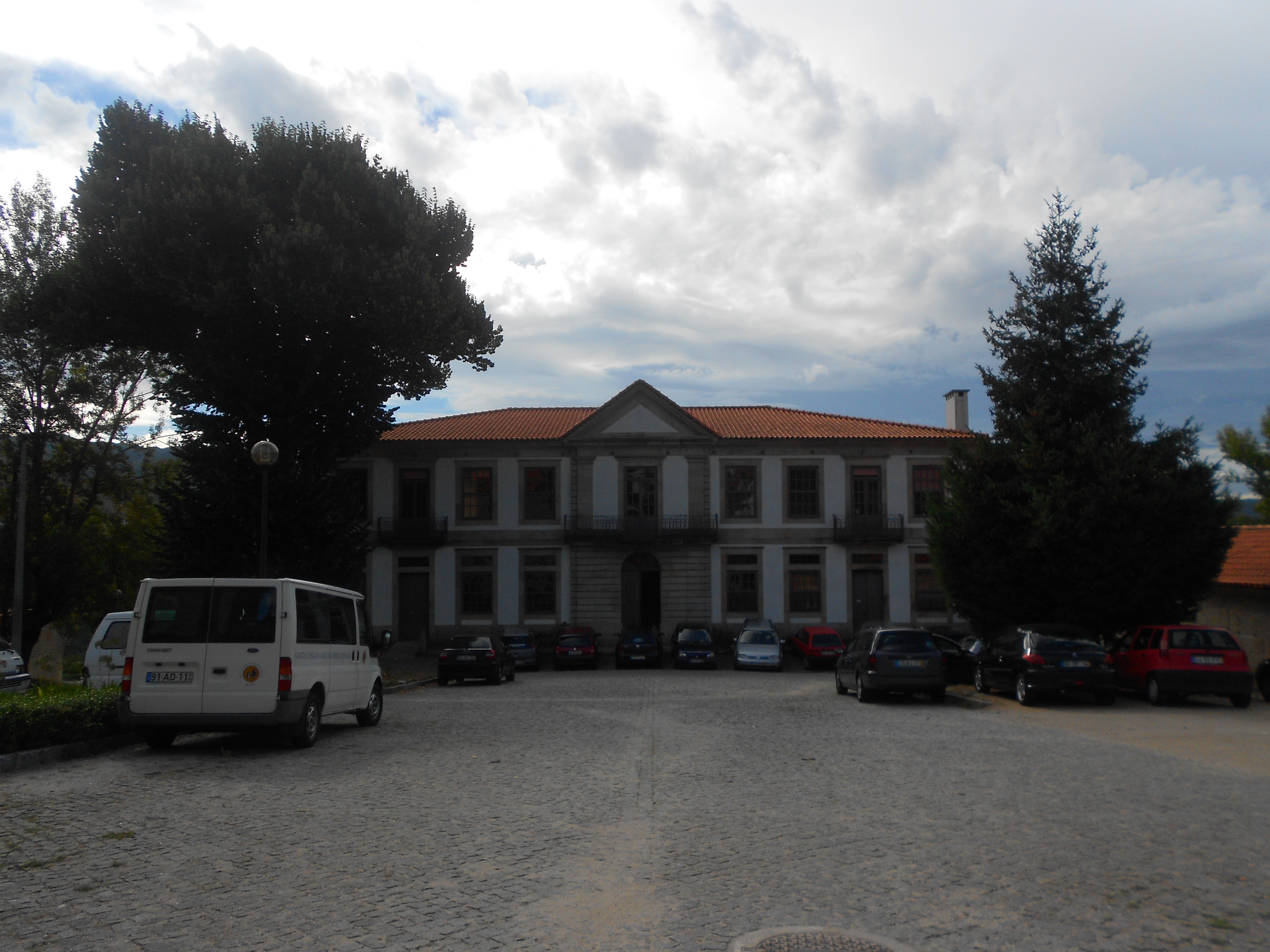 Entrada Casa de Chavães